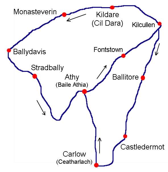 Circuit de la coupe Gordon-Bennet 1903 - Sud-Ouest de Dublin (Irlande)